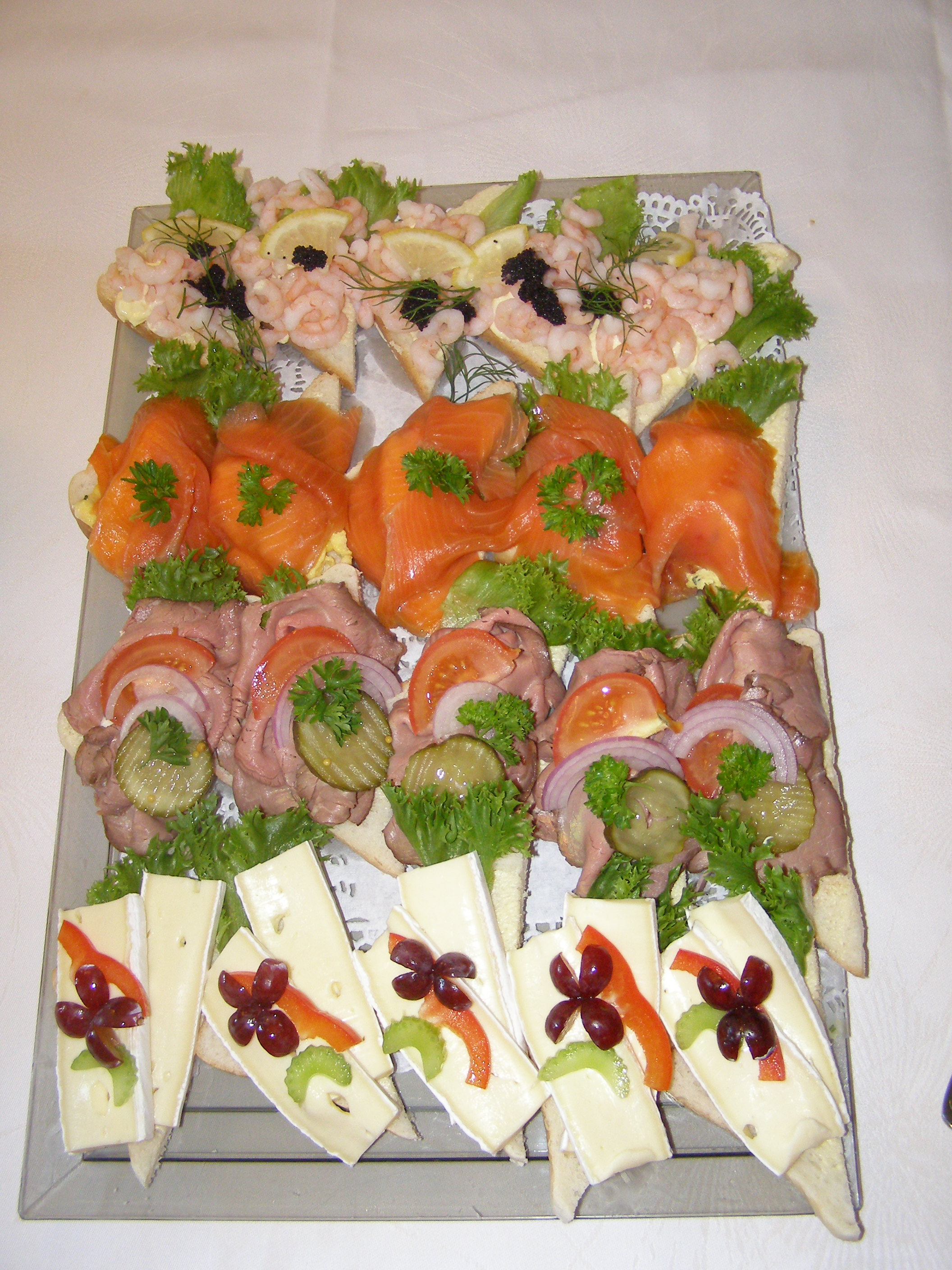 Smørbrød, Norwegian open sandwich